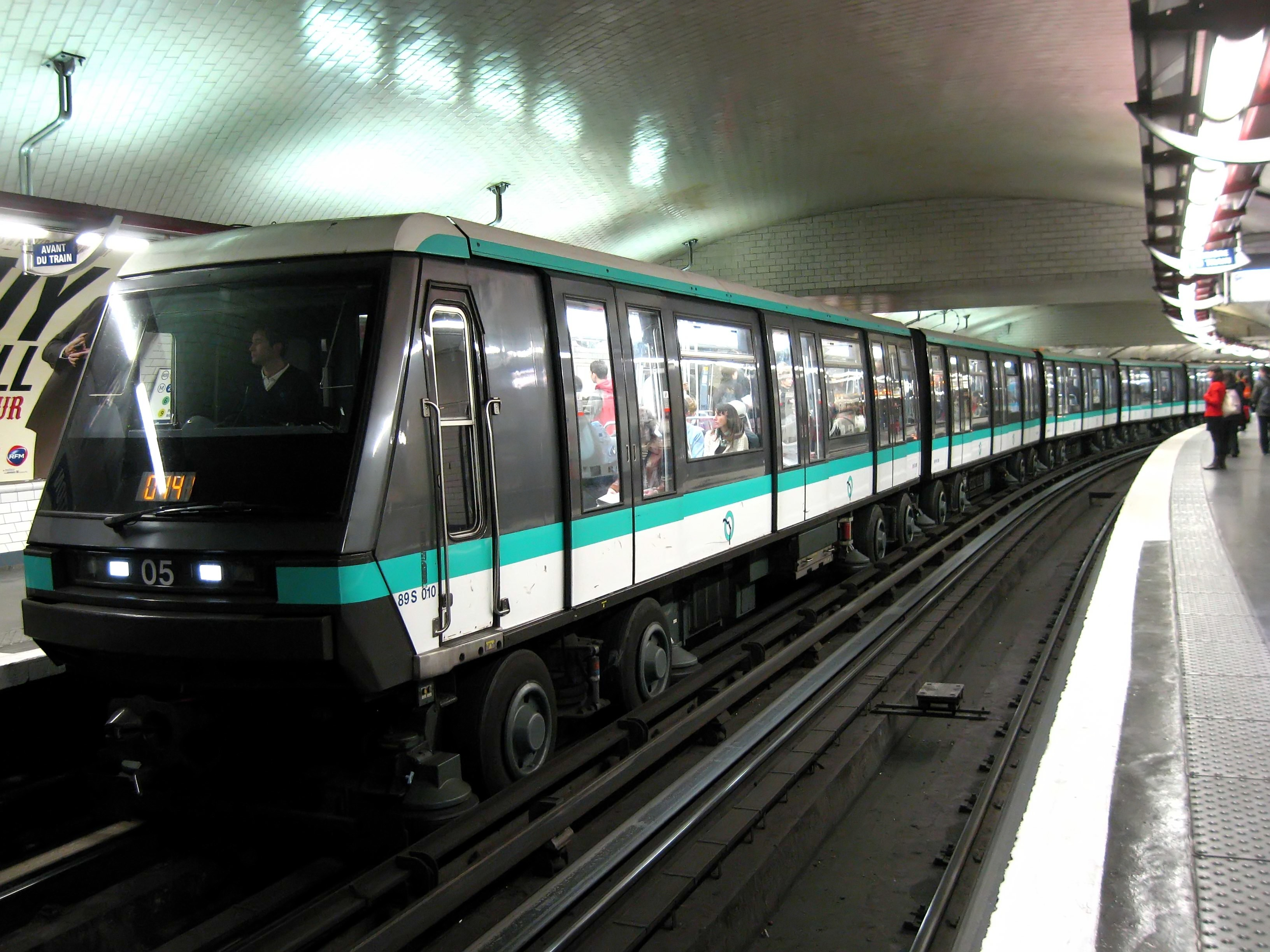 Métro de Paris, Station Nation (ligne 1), Paris, France